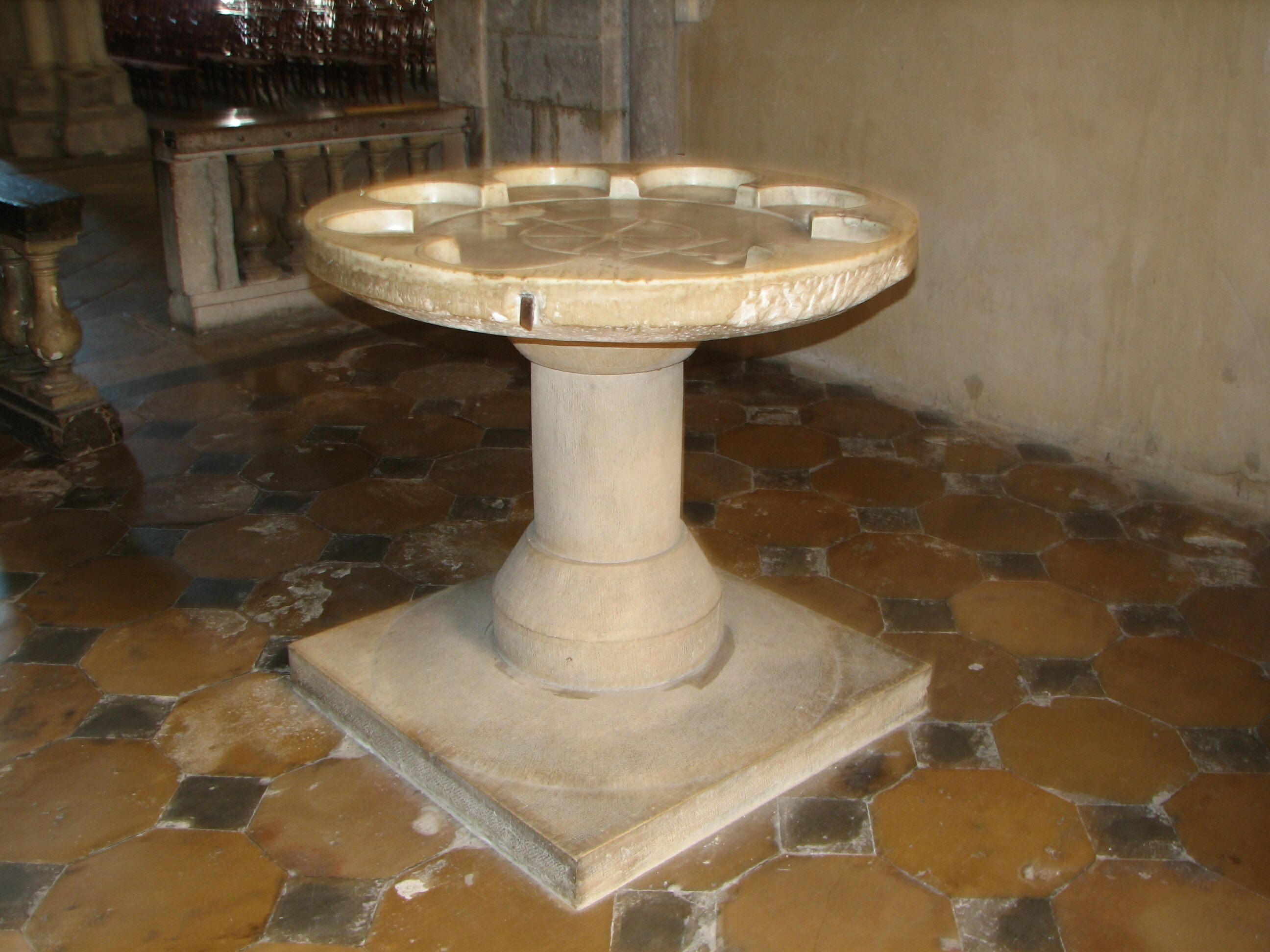 Autel circulaire de la cathédrale de Besançon (Doubs, France).